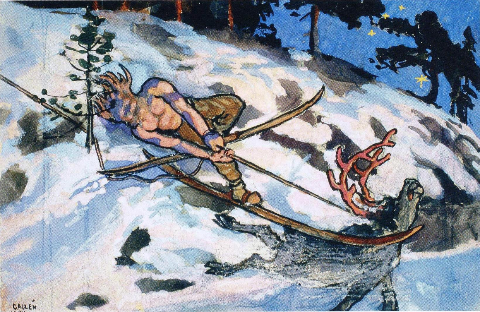 Axel Gallénin Kalevala-aiheinen vesivärimaalaus esittää Lemminkäistä pyytämässä Hiiden hirveä. Kuuluu yksityiskokoelmaan.